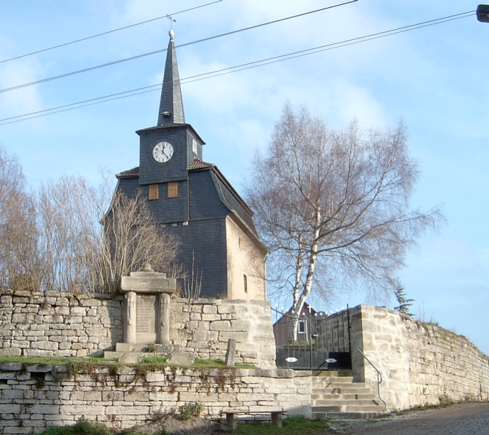 Evangelisch-Lutherische Kirche in Rippersroda, Thüringen. Im Vordergrund ist eine Gedenktafel für die Gefallenen des 1. Weltkrieges zu sehen.